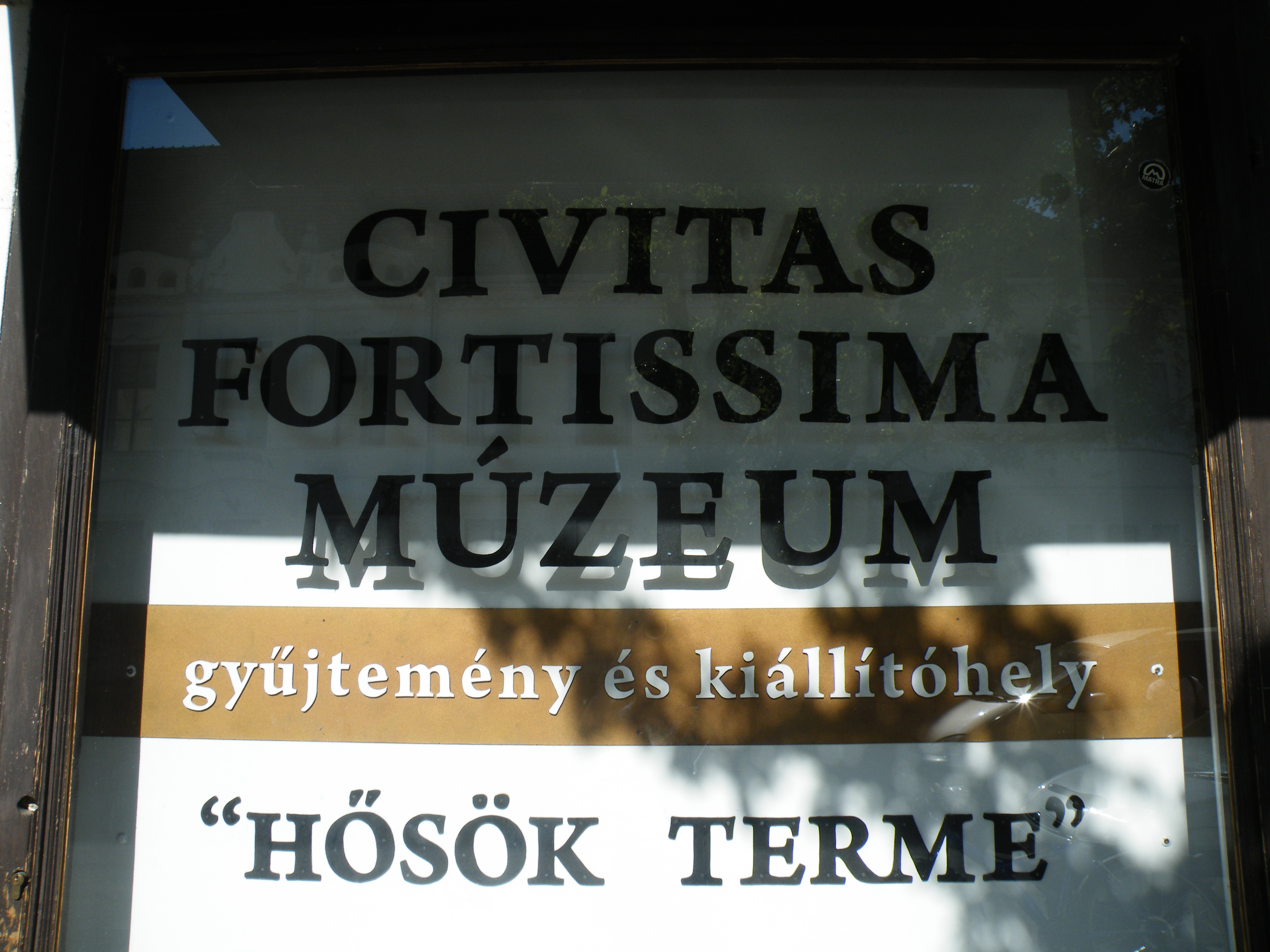 A Civitas Fortissima Múzeum névtáblája a Madách Filmszínházban